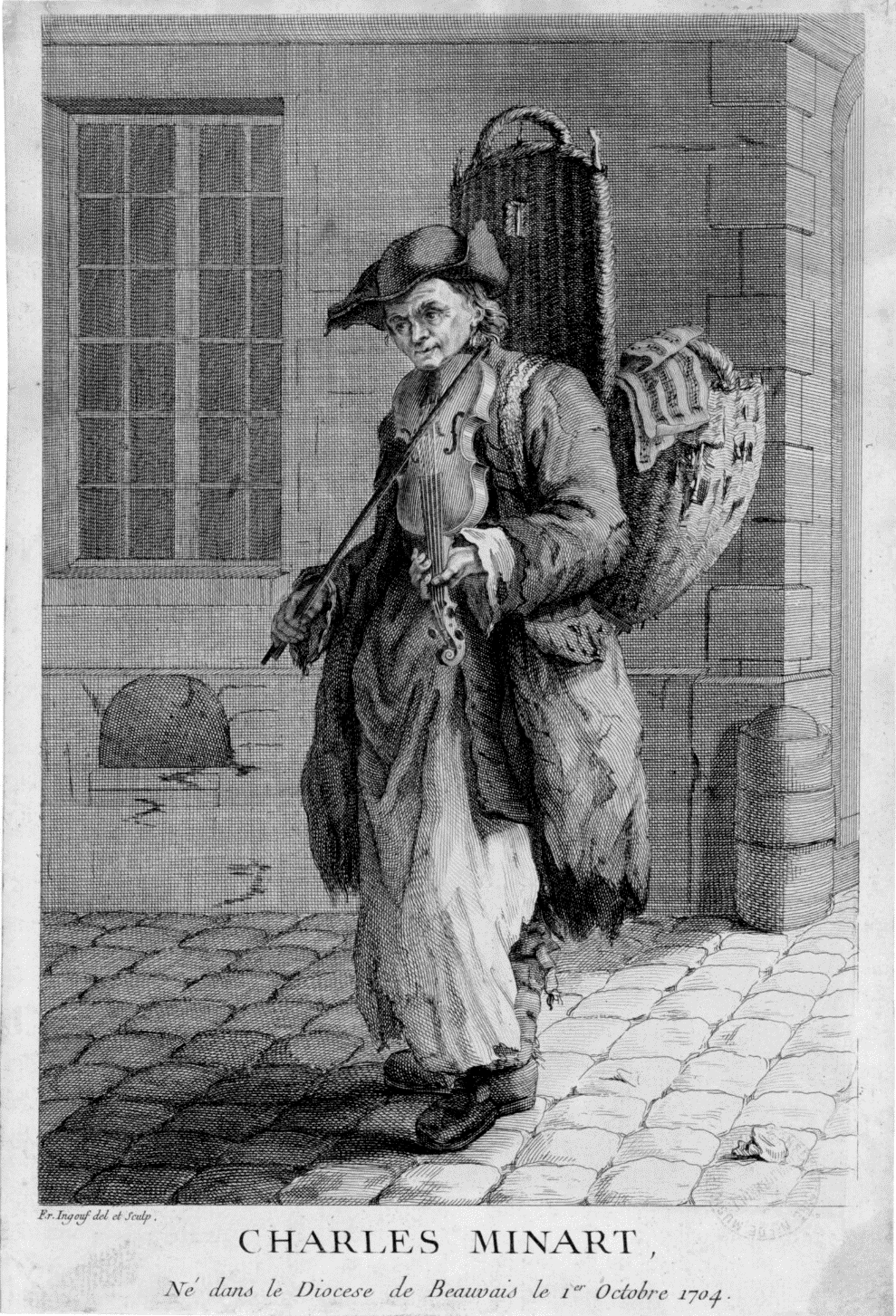 Charles Minart, né dans le diocèse de Beauvais le 1er octobre 1704, par François Robert Ingouf, Graveur (1747-1812).